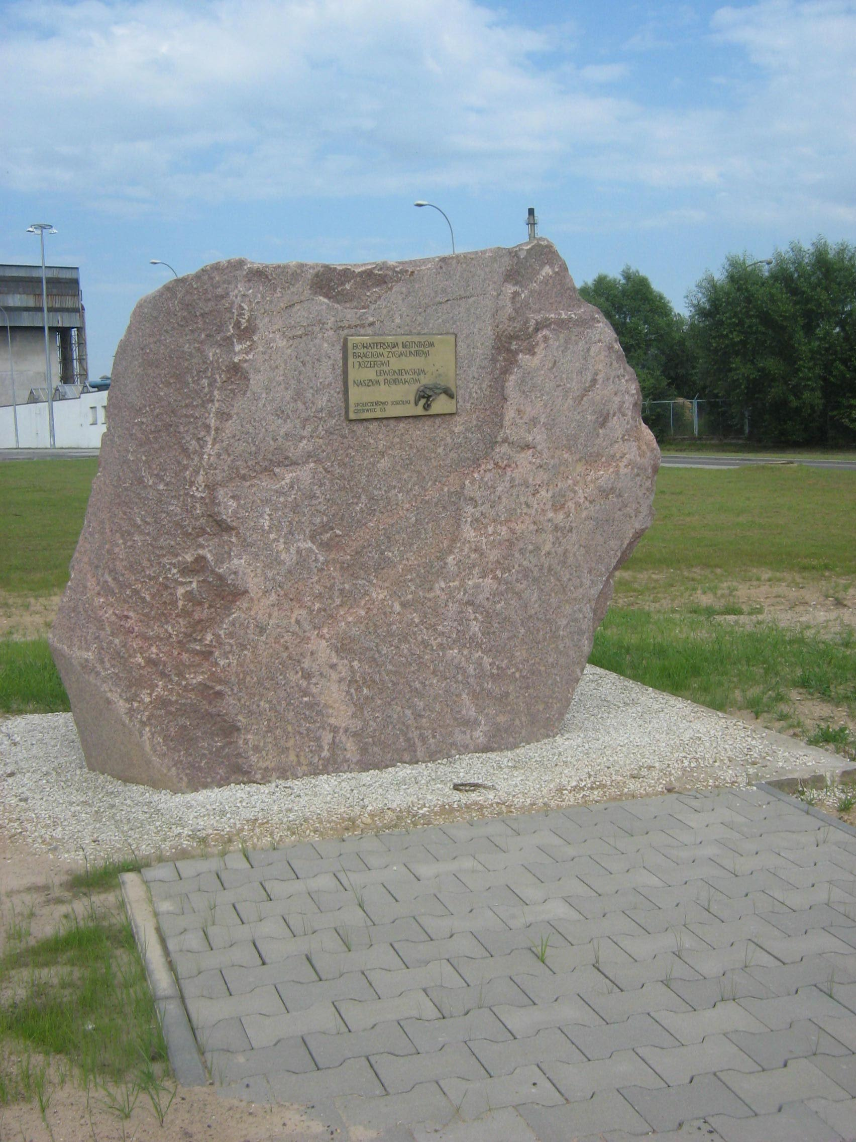 Pomnik-głaz poświęcony pamięci braciom Zygmuntowi i Józefowi Lewindowskim w Sokółce. Na głazie widnieje napis: "BOHATERSKIM LOTNIKOM BRACIOM ZYGMUNTOWI I JÓZEFOWI LEWONIEWSKIM NASZYM RODAKOM społeczeństwo Sokółki czerwiec 83"